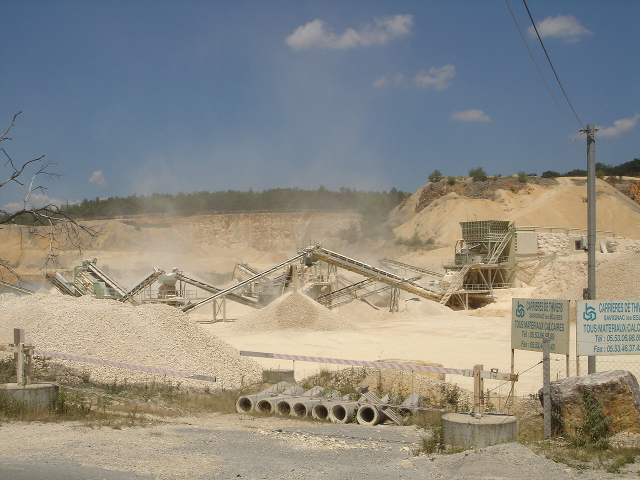 Steinbruch der "Carrières de Thiviers" in Savignac-les-Eglises (Périgord Blanc). Hier wird besonders heller Kalkstein gewonnen.